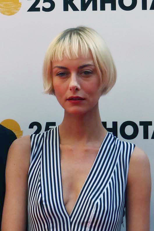 Северия Янушаускайте на церемонии закрытия открытого российского кинофестиваля «Кинотавр» в Сочи.